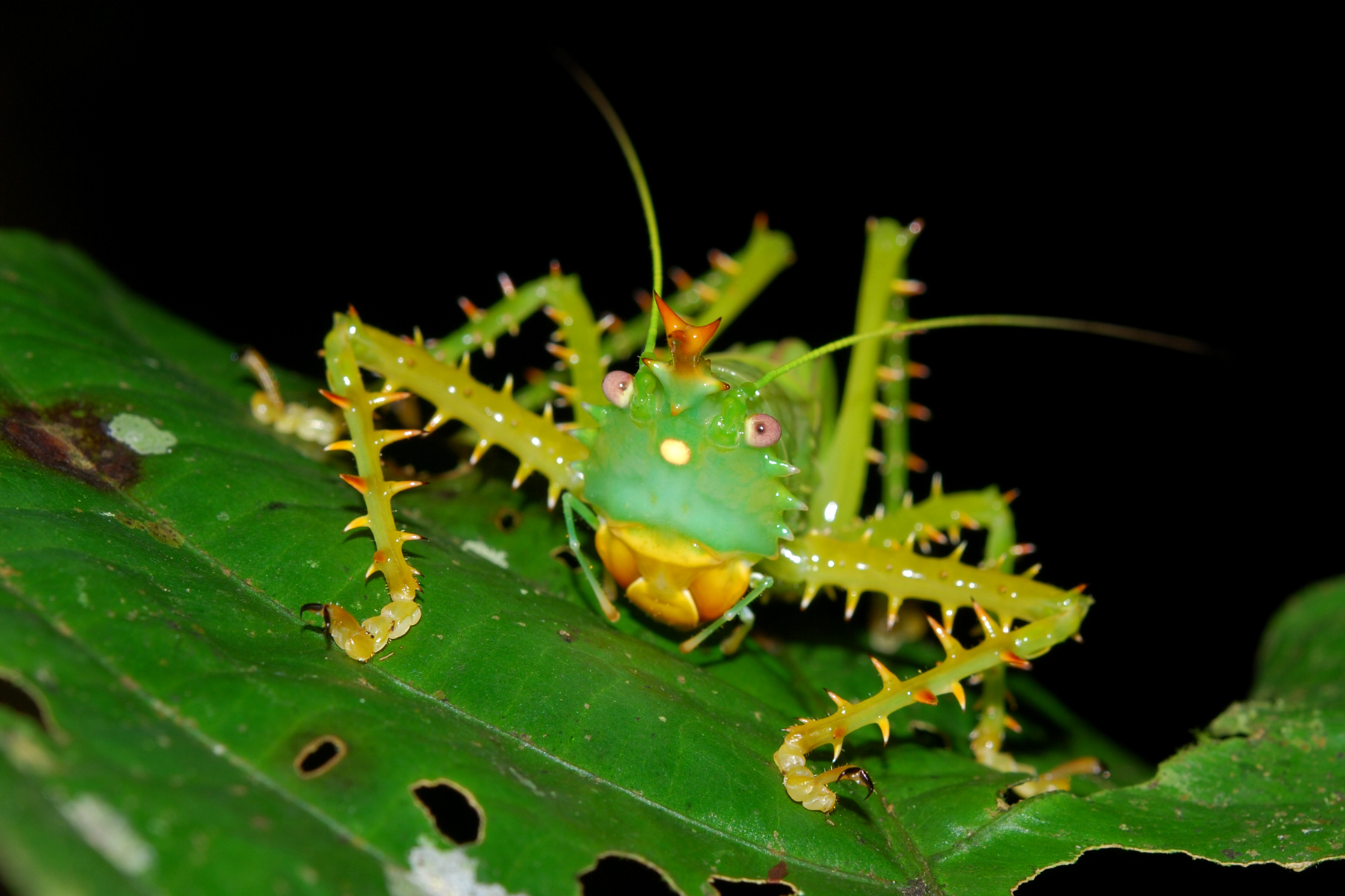 Panacanthus cuspidatus